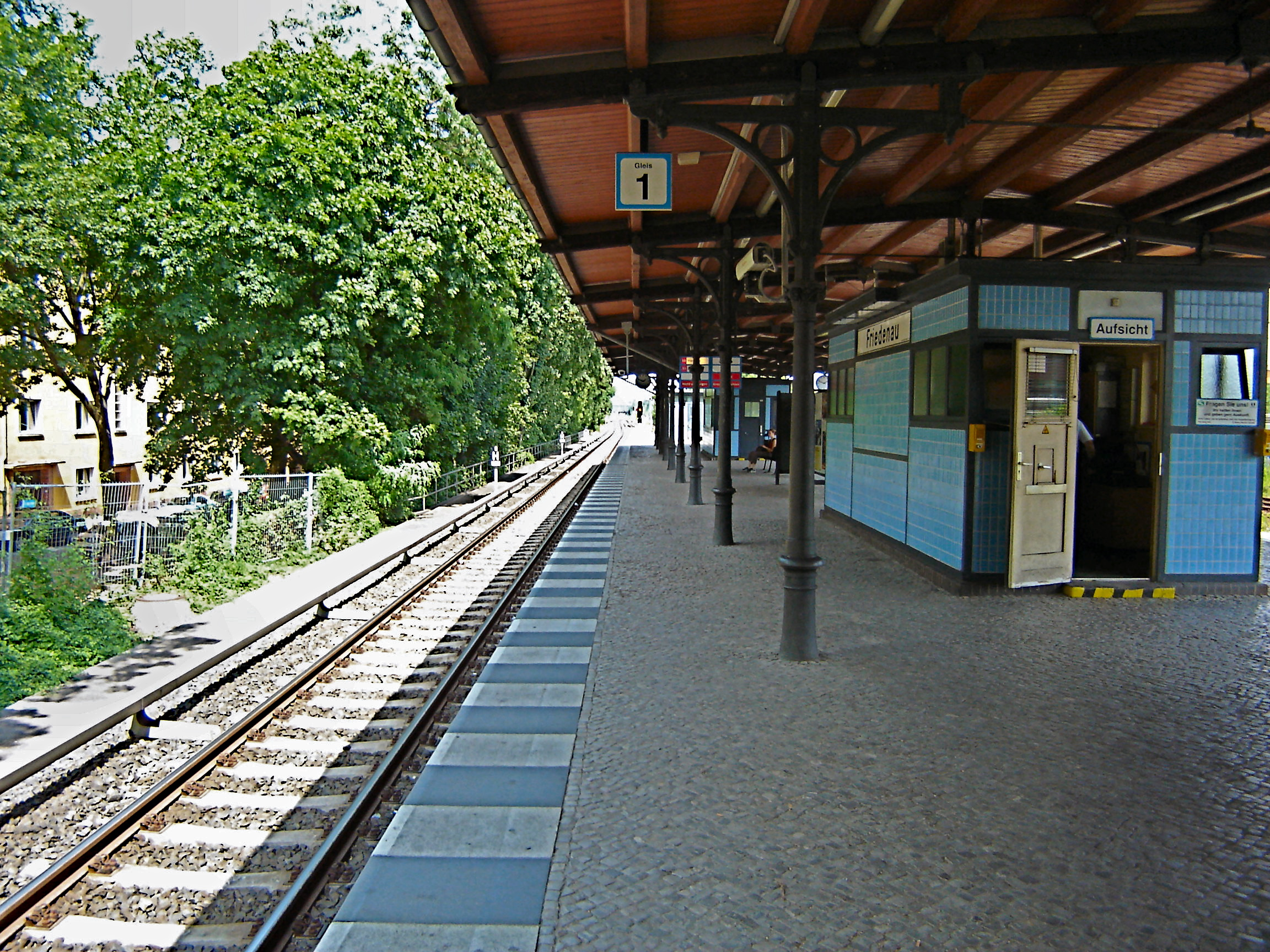 S-Bahnhof Friedenau.JPG, Berlin-Friedenau Source: Self-made, July 2006 Author: BishkekRocks